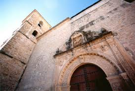 Puerta delantera